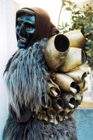 Los mamuthones de Maoniada